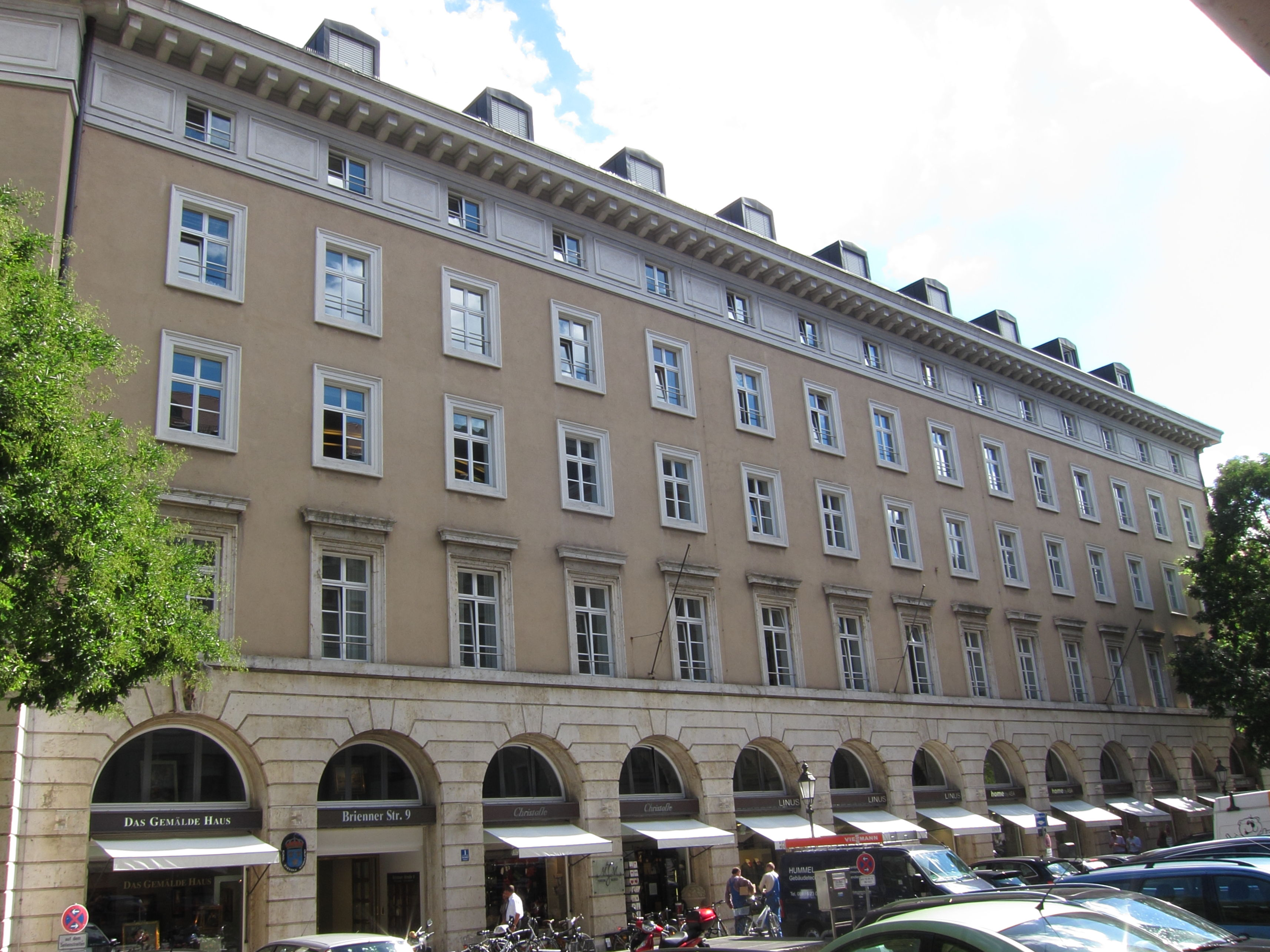 Amiraplatz 1; Geschäftshaus, ehemals der Vereinigten Werkstätten, neuklassizistischer Eckbau, nördlicher Bauteil als palastartiger Rechteckblock ausgebildet, westlich langgestreckter Seitentrakt, im Erdgeschoss große Schaufensterarkaden mit Natursteinverblendung, von Robert Seitz, 1938-40.